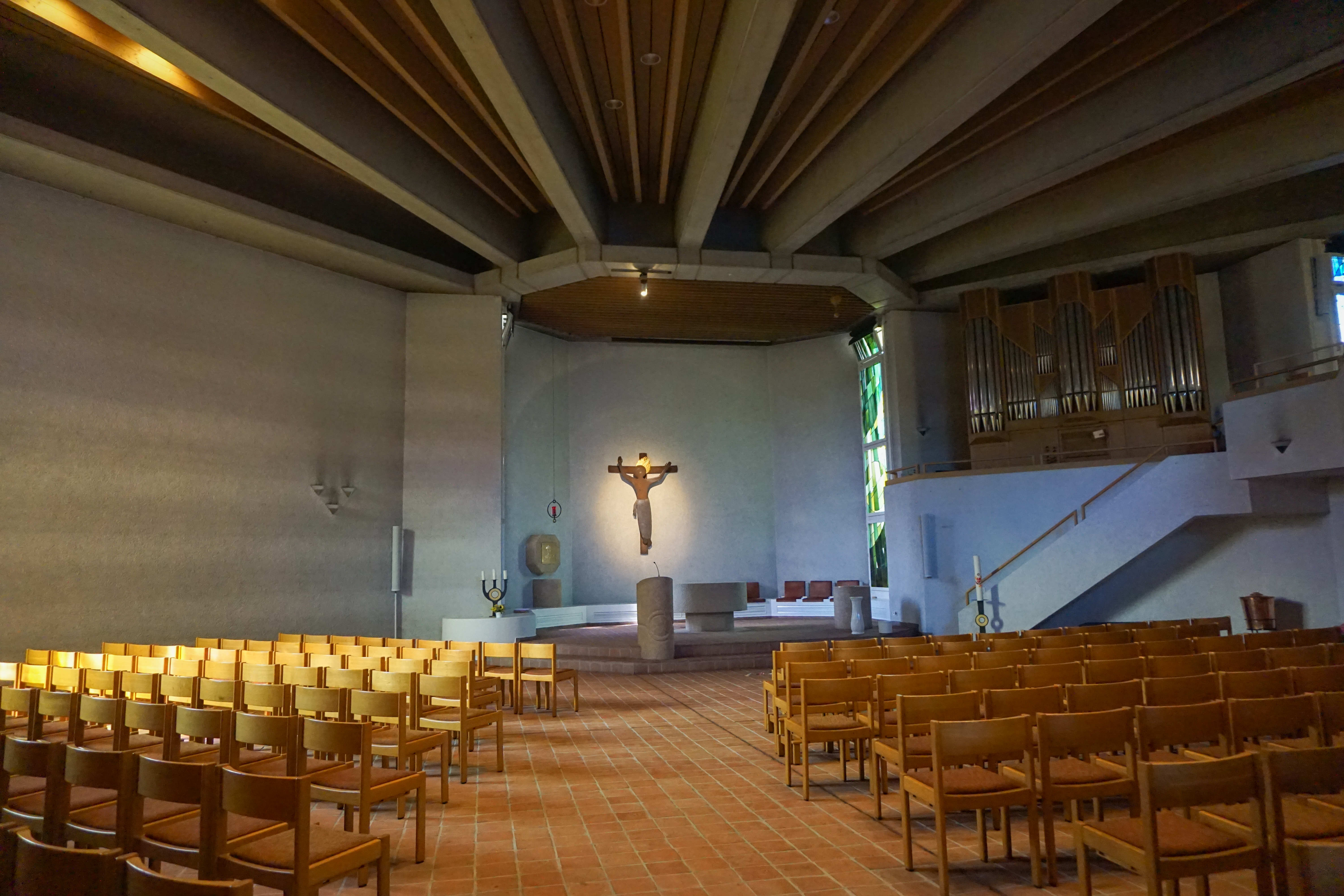 Kirchenschiff Übersicht zum Chor